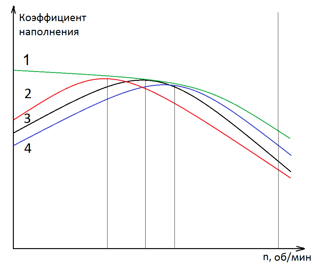 Ввиду трудностей розыска на викимедиа, нарисовал свою иллюстрацию